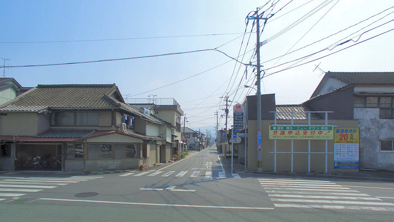 JR鹿児島本線有佐駅 駅前風景 駅舎前から南東方向を見る。 写真中央の道路を進むと県道156号鏡宮原線に合流する。更に直進すると国道3号に至り、旧宮原町の中心部に出る。 良い写真があれば差し替えてください。 撮影者/著者/著作権保有者 : MK Products (本人がアップロード) 撮影日 : 2007/10/05 有佐駅用にアップロードした画像です。良い画像があれば別の画像に変えてください。